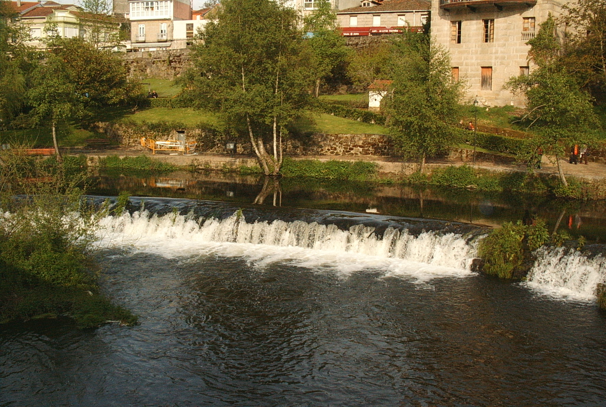 O río Arnoia ó seu paso por Allariz.